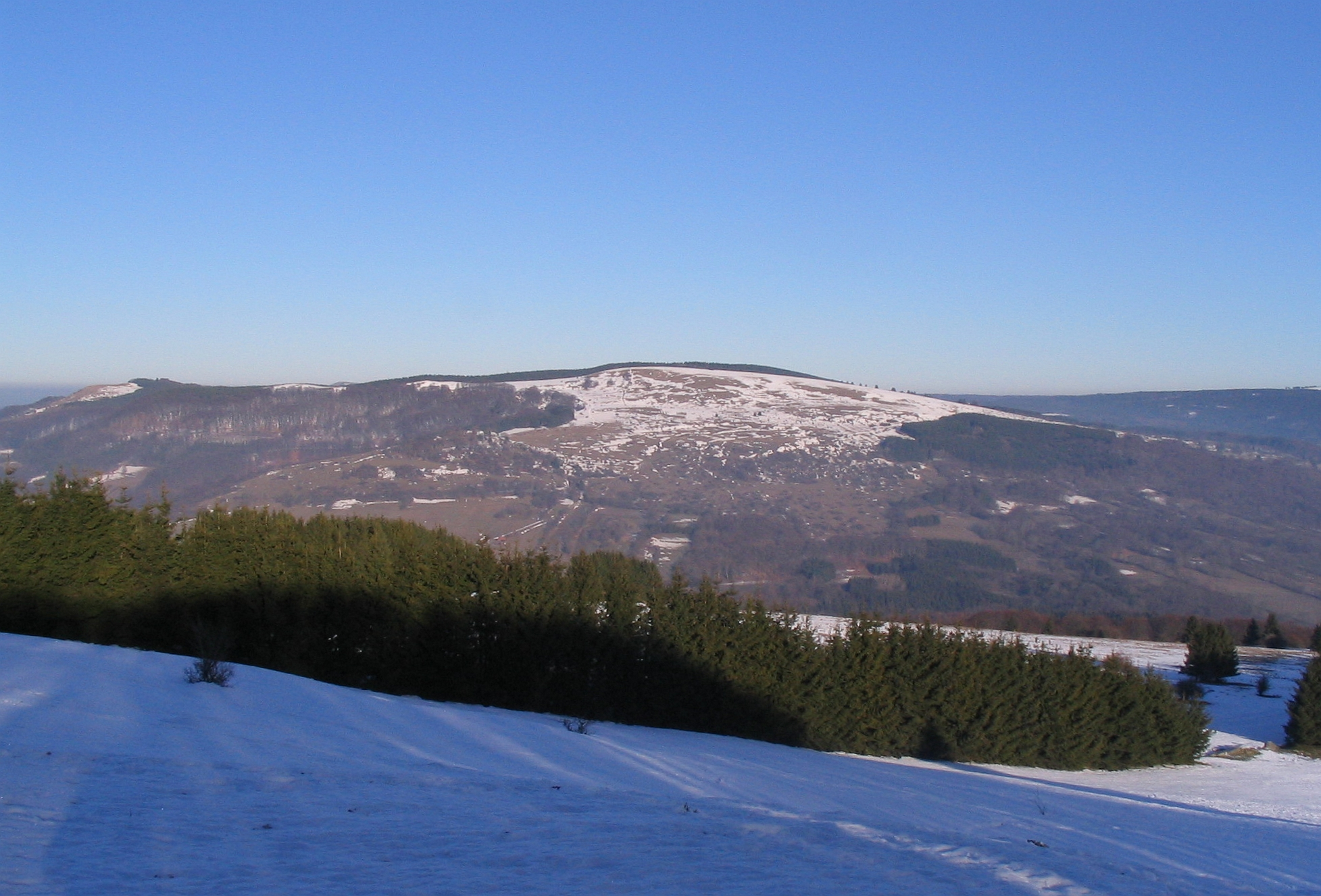 Blick vom Arnsberg (843 m) nach Norden auf den Himmeldunkberg (888 m).